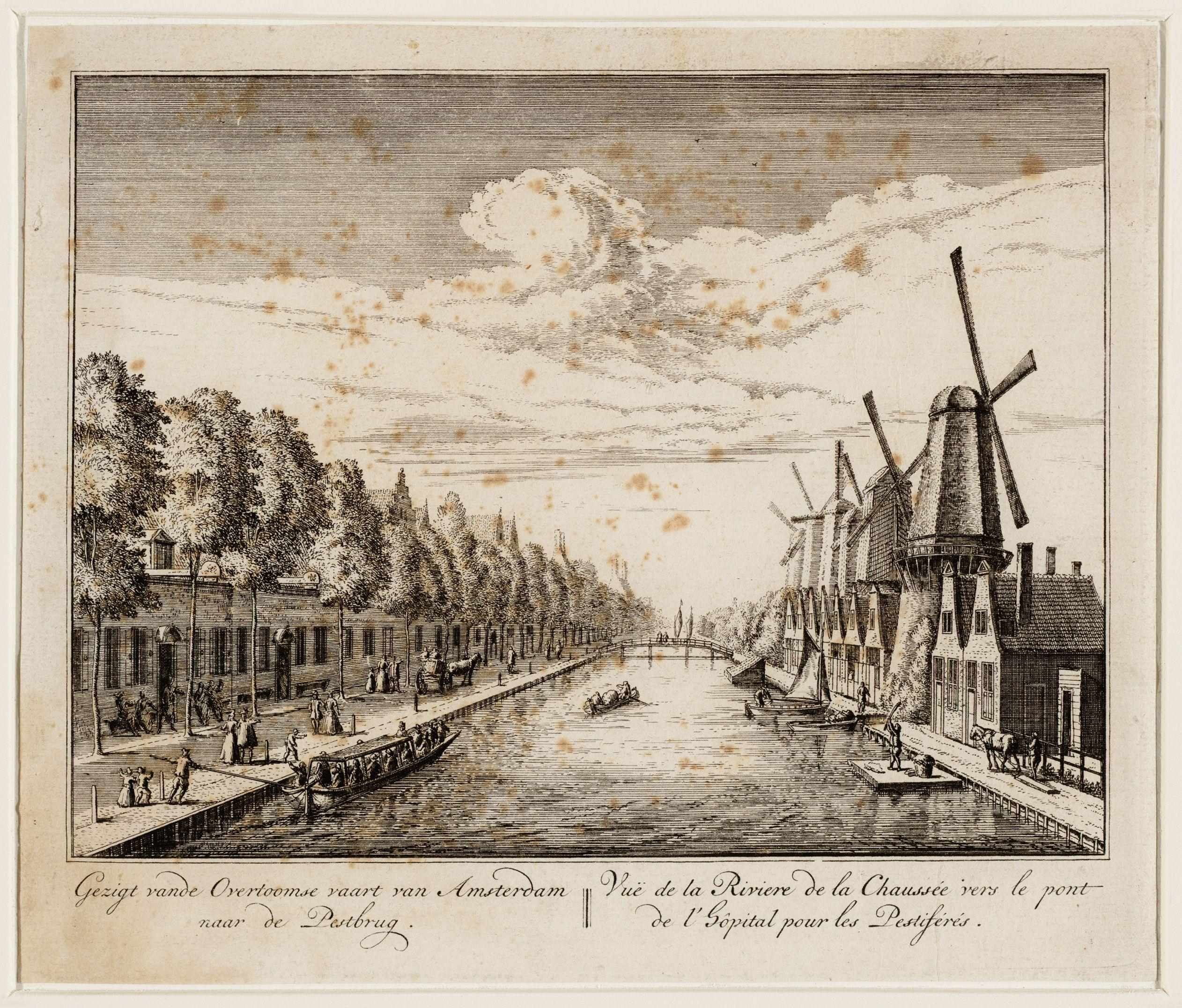 De Overtoomsevaart in Amsterdam gezien in de richting van de Pestbrug. 1730. etching. Afmetingen onbekend. Amsterdam, Stadsarchief Amsterdam, collectie tekeningen en prenten. - Gezien van de brug in de Singelweg naar de Pestbrug. Van rechts naar links de molens: "de Rosenboom", "de Vier Winden", "de Spinner", "de Lelie", "het Jagt" (Het Hoornse Jagt) en "de Wolf". Techniek: ets en gravure